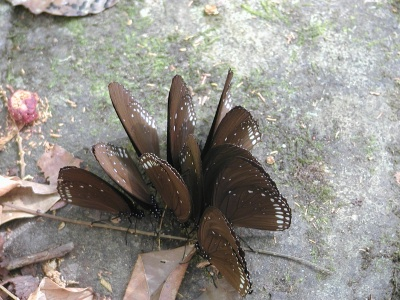 Euploea core puddling